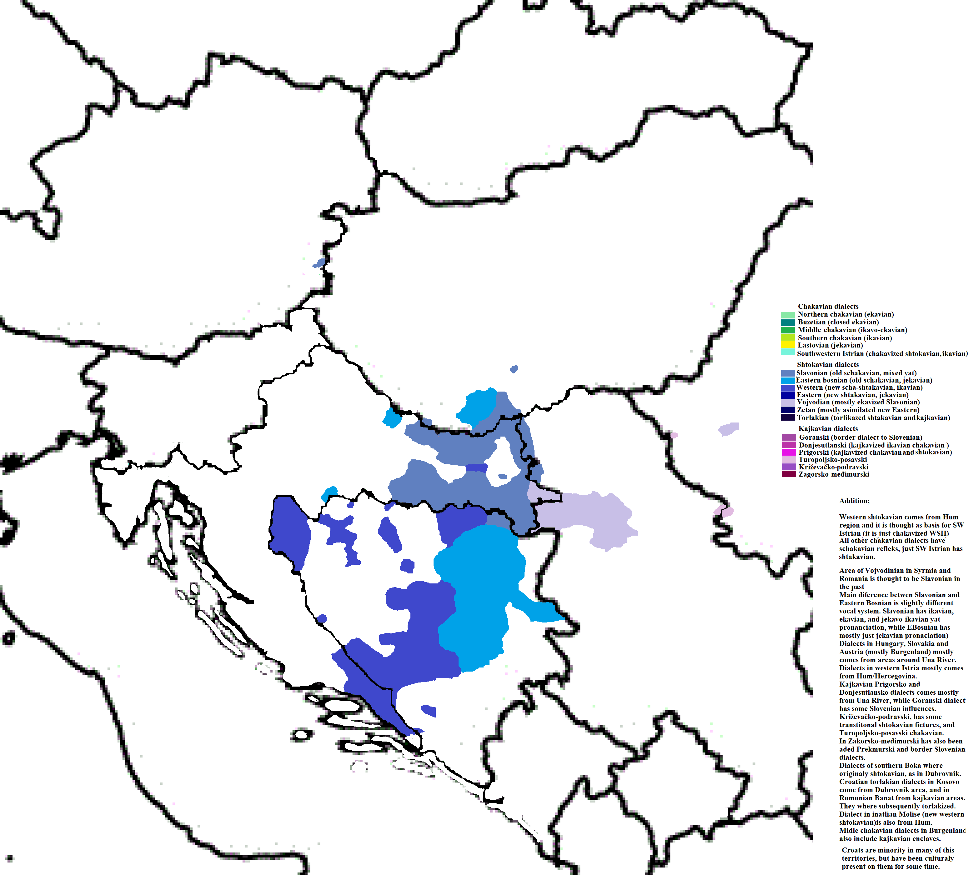 Šćakavski i povezani dijalekti; slavonski, istočno bosanski, šćakavski poddijalekt zapadnog kao i štokavizirane enklave i područja koja su nekoć bila slavonska na istoku (Srbija, Rumunjska)